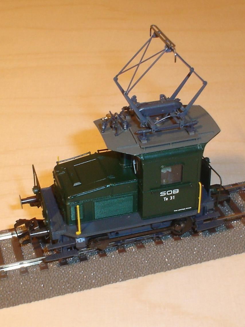 Rangiertraktor Te 2/2 III mit der Spur H0 des Deutschen Modelleisenbahnherstellers Brawa auf Zweileiter-Gleichstrom Geleisen aus dem Hause Trix.